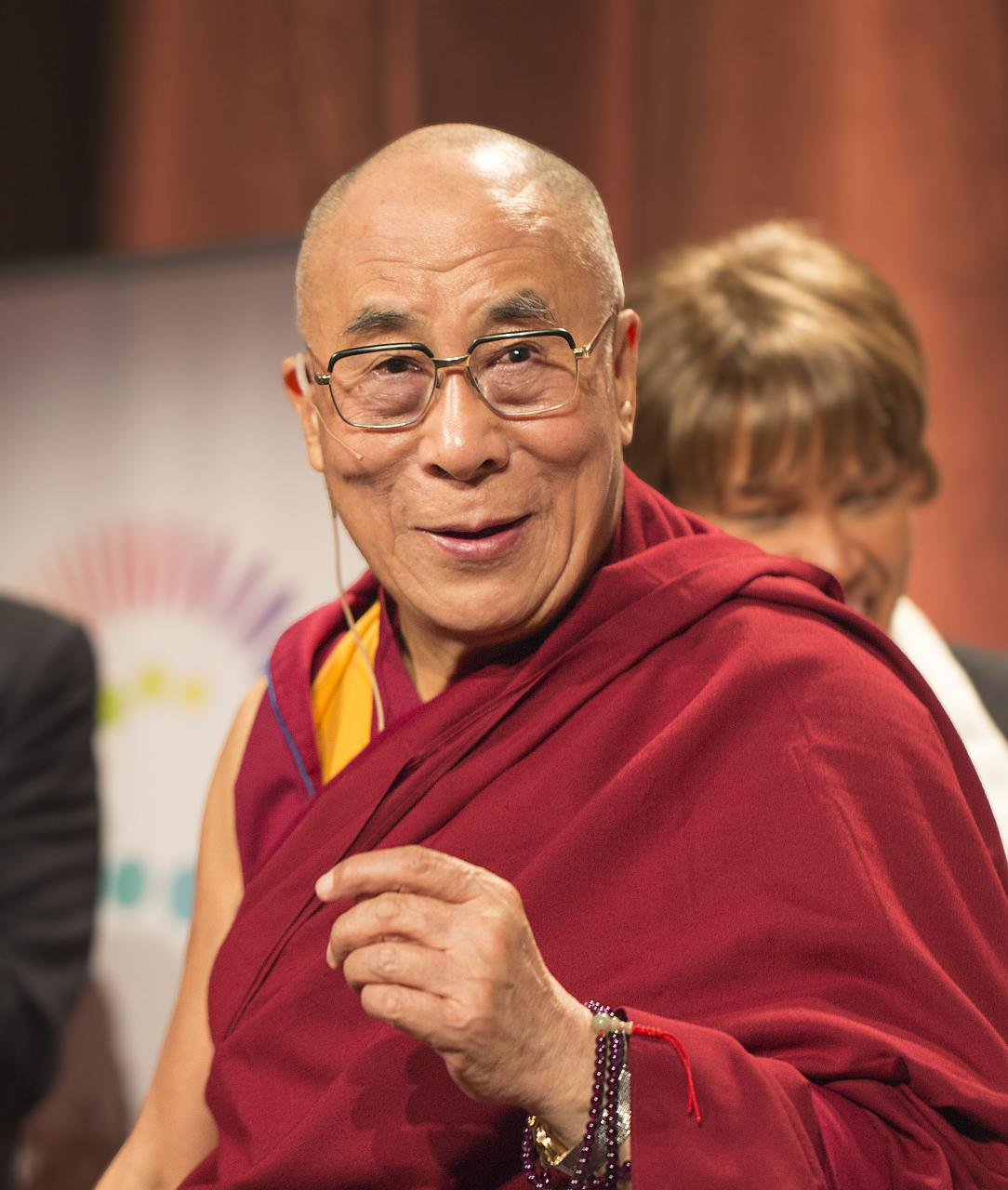 dalailama1_20121014_4639